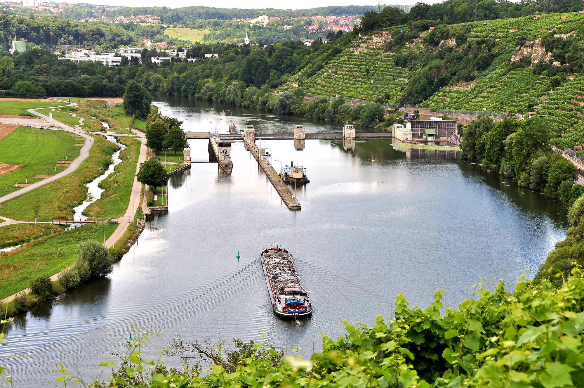 Landschaftsschutzgebiet 1.18.056 „Neckartal zwischen den Neckarbrücken von Hochberg und Neckarweihingen mit Randgebieten, insbesondere Uhlberg, Lochholz und Beuzlen“ – Links im Bild das neu geschaffene Naturbiotop "Zugwiesen". Man erkennt ein Fließgewässer, welches die früher üblichen Fischtreppen naturnah ersetzt. In Bildmitte der Neckar mit der Staustufe Poppenweiler, Schleuse und Wasserkraftwerk. Rechts die steilen Rebhänge "Bergen".